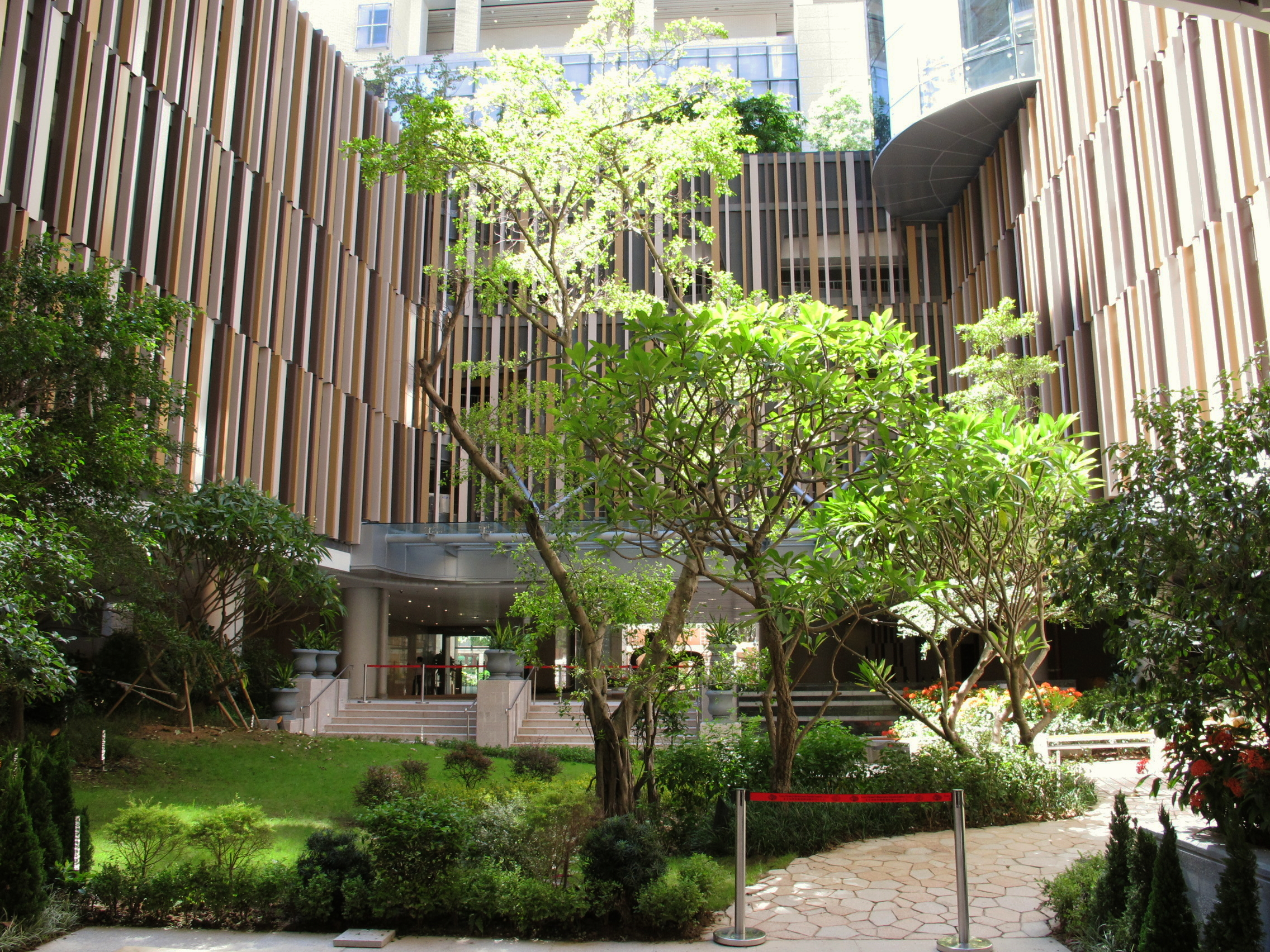 Lion Rise landscape garden 現崇山